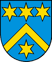 Wappen von Tomils Kanton Graubünden Schweiz